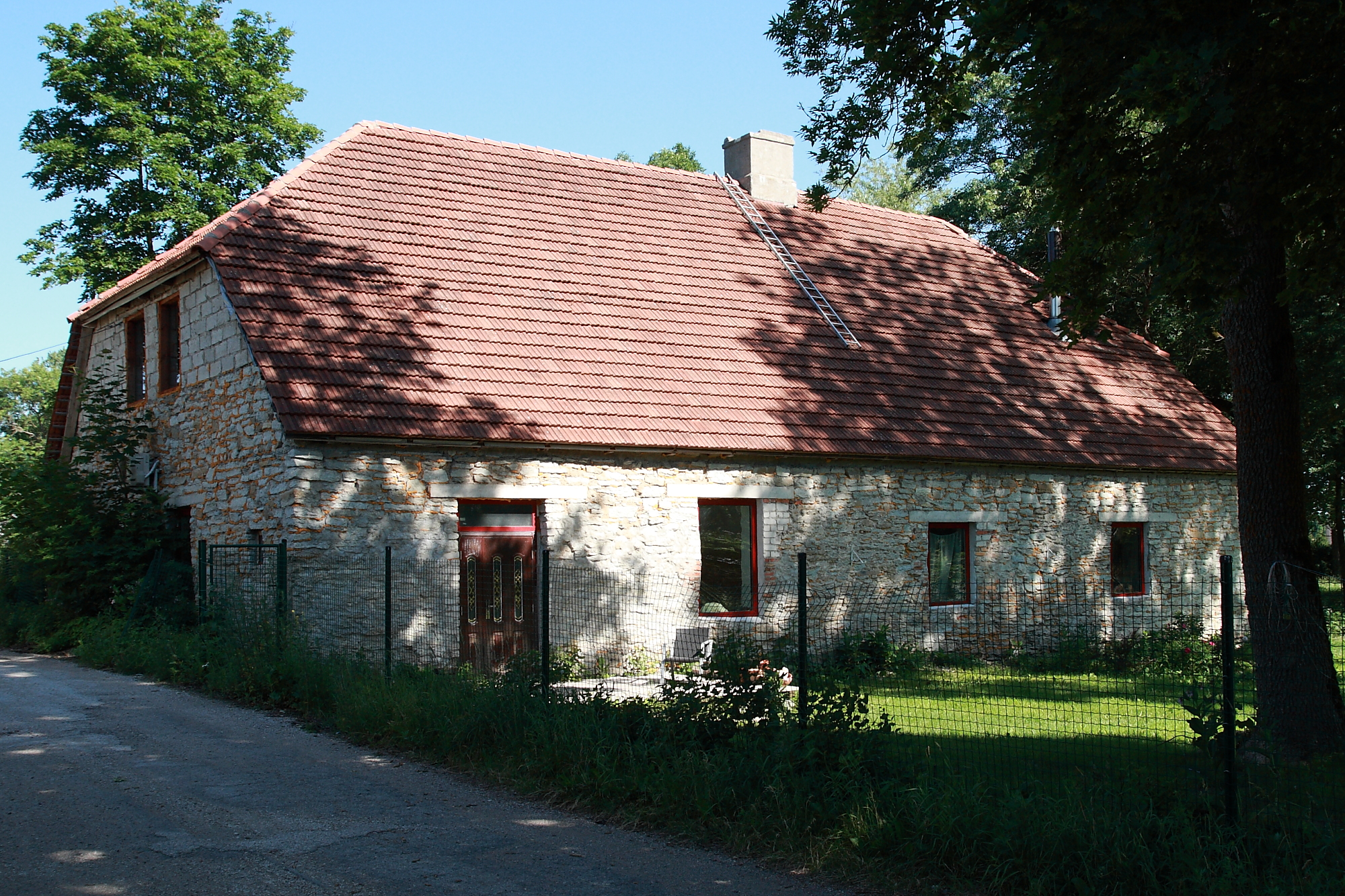 Lehola mõisa valitsejamaja, 18.-20. saj